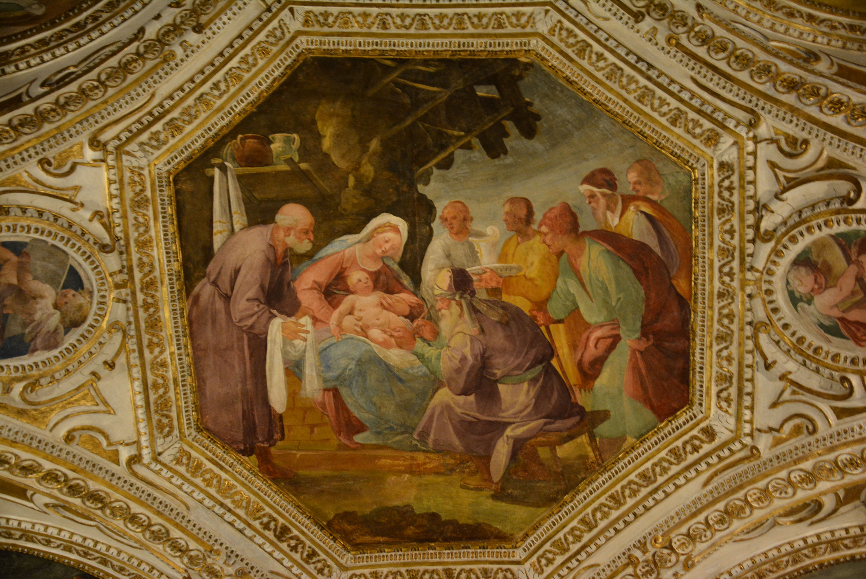 Cripta della cattedrale di Salerno